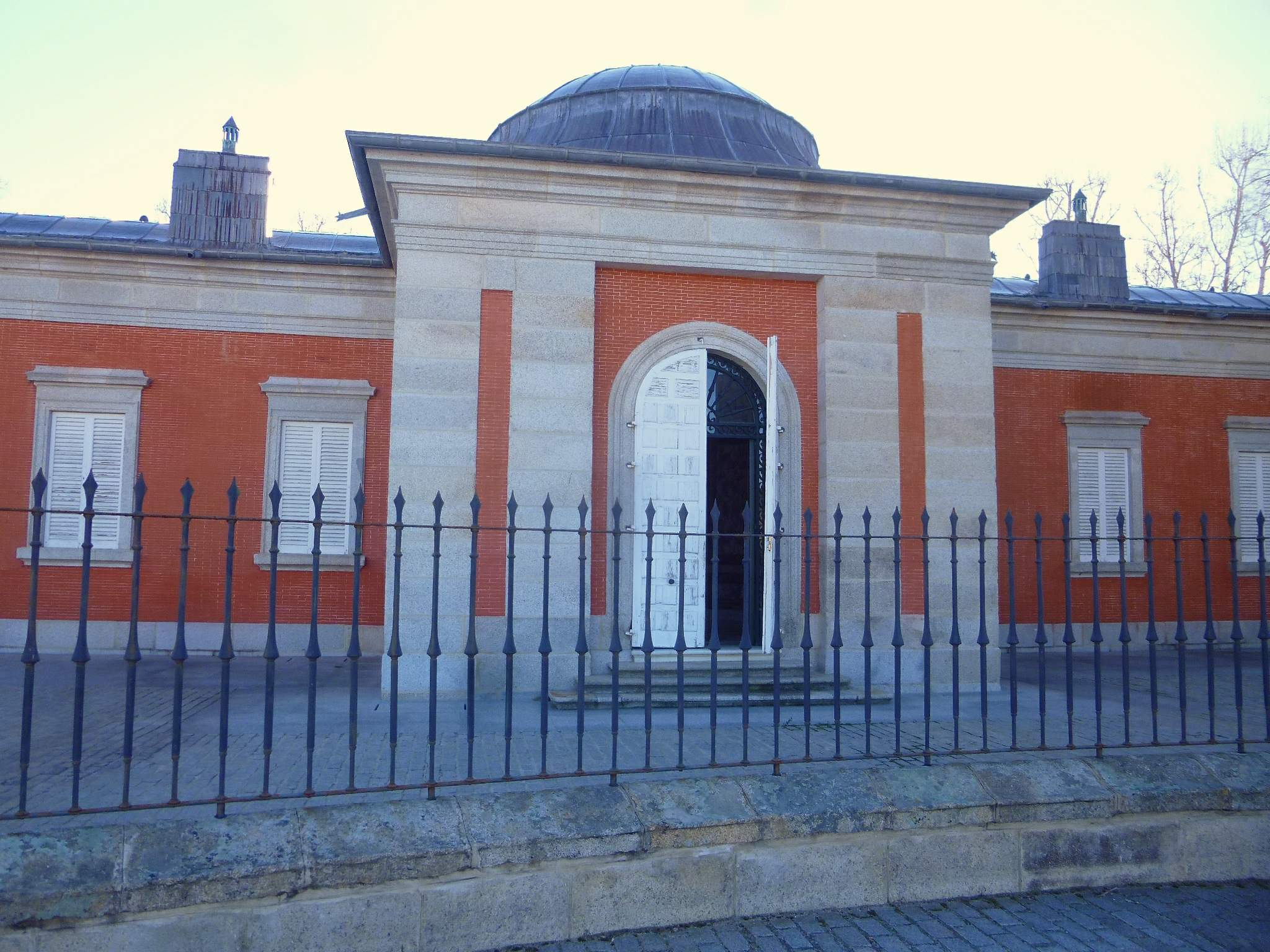 Casita del Príncipe (El Pardo, Madrid)